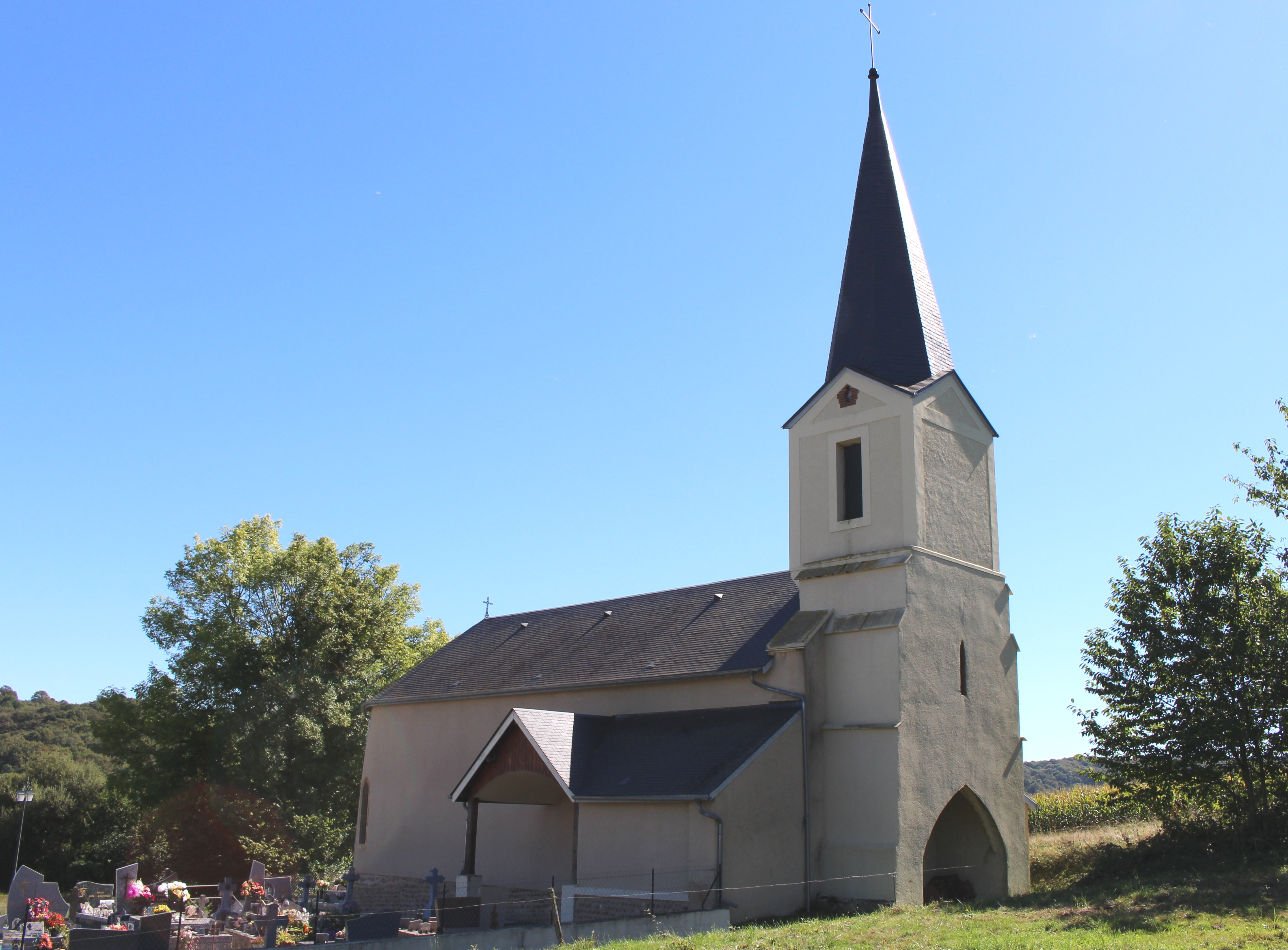 Église de l'Assomption de Bugard (Hautes-Pyrénées)